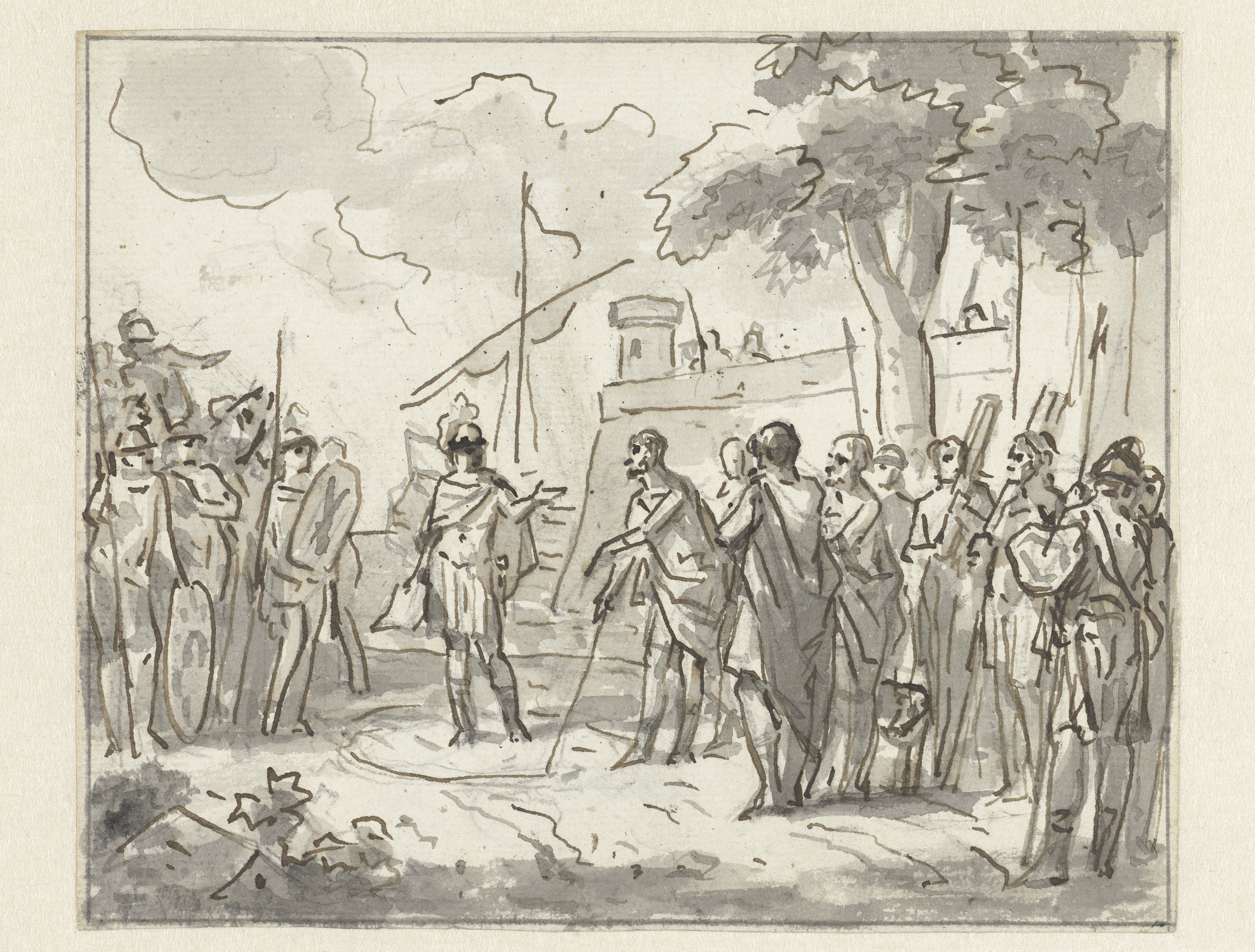 IdentificatieTitel(s): Laenas trekt een cirkel rond Antiochus IV Epiphanes in het zandObjecttype: tekening Objectnummer: RP-T-00-1082VervaardigingVervaardiger: tekenaar: Jurriaan AndriessenDatering: 1752 - 1819Fysieke kenmerken: penseel in grijs, grafiet, pen in bruinMateriaal: papier inkt grafiet Techniek: pen / penseelAfmetingen: h 155 mm × b 190 mmOnderwerpWat: the consul C. Popilius Laenas, commissioned by the Roman senate to order Antiochus IV Epiphanes to abstain from war, with his staff draws a circle around the monarch and asks him not to go beyond it before answeringWie: Gaius Popillius LaenasAntiochus IV EpiphanesVerwerving en rechtenVerwerving: onbekendCopyright: Publiek domein